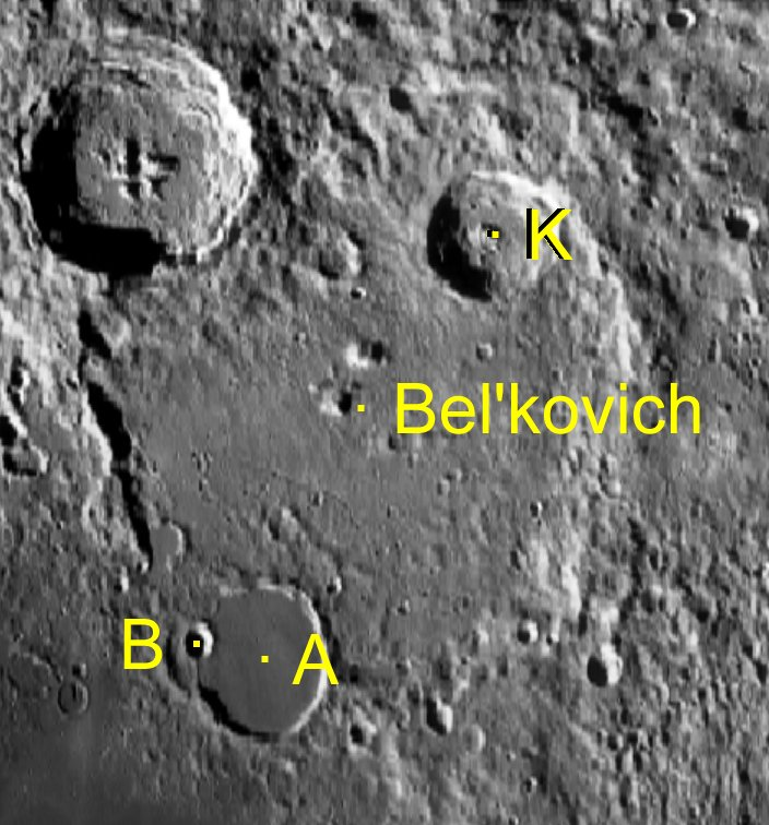 Cráter lunar Bel'kovich. Cráteres satélite. (Imagen LRO)